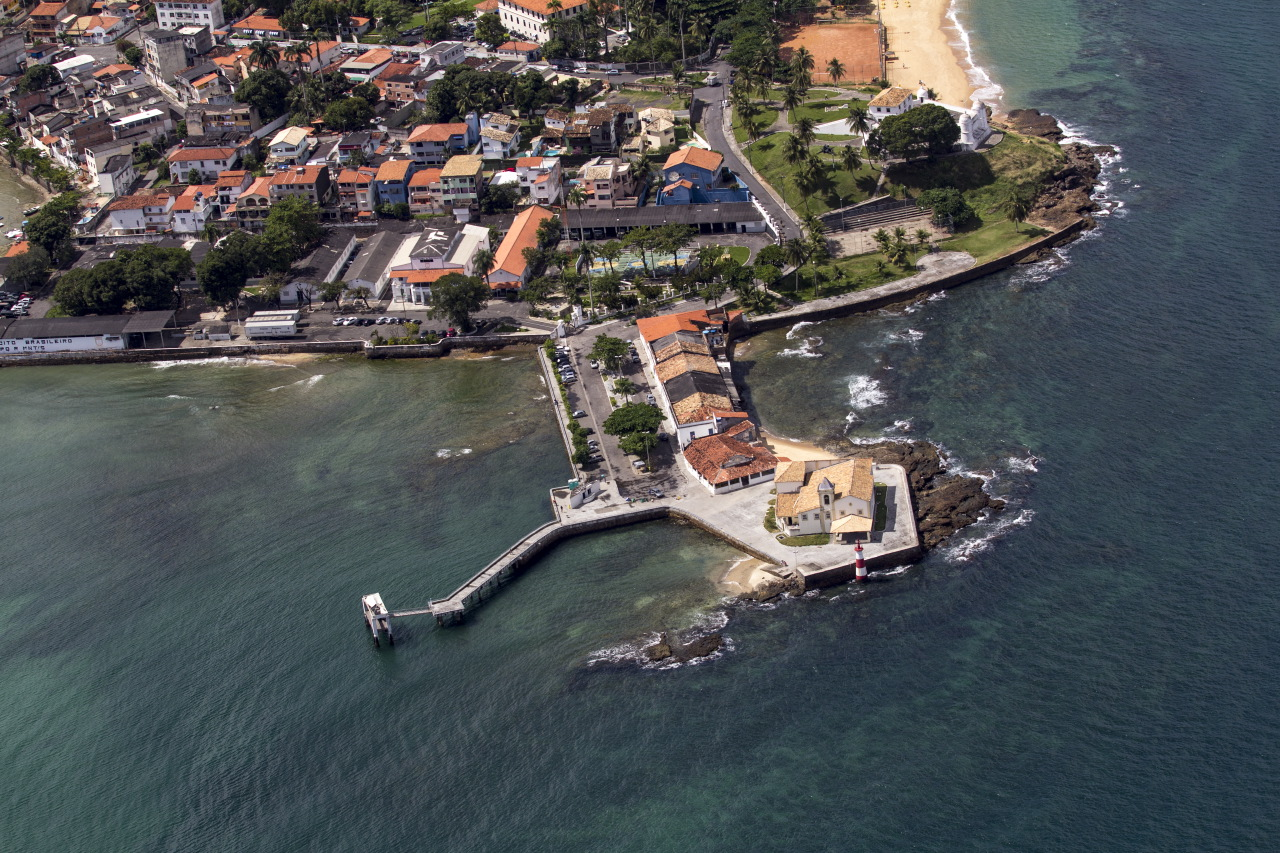 Vista aérea do Forte de Nossa Senhora de Monte Serrat e o Farol de Monte Serrat, em Salvador.